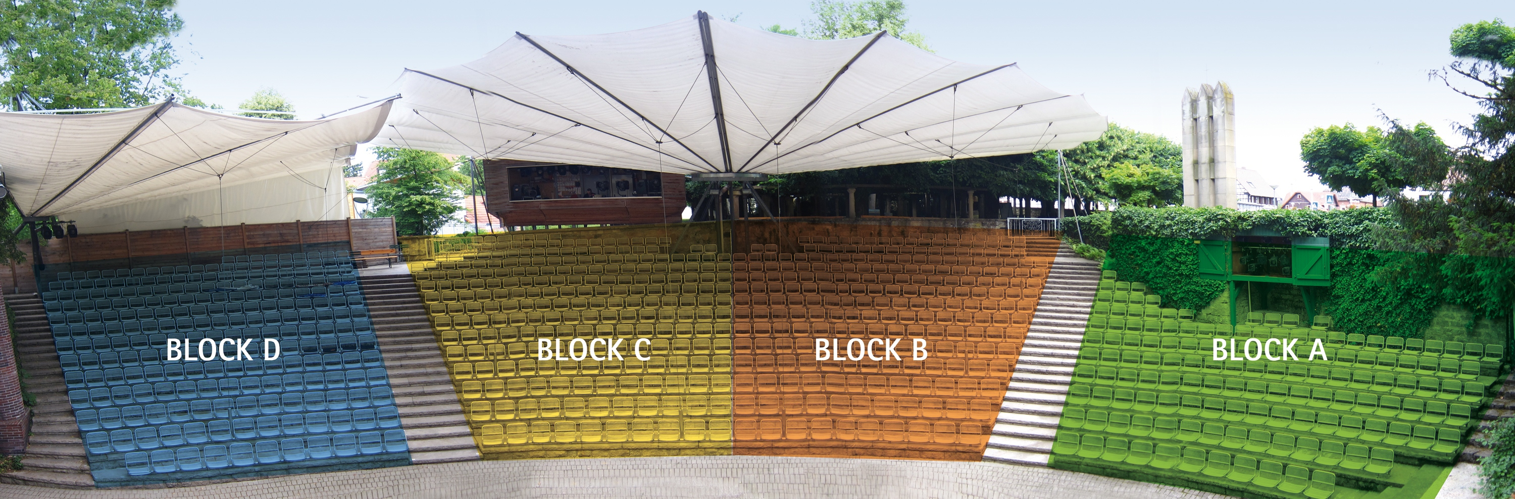 Panorama der Sitzplätze der Bühne im Schlossgraben bei den Freilichtspielen Neuenstadt mit der freitragenden Zeltdachkonstruktion, Technikturm und Aufteilung der Blöcke